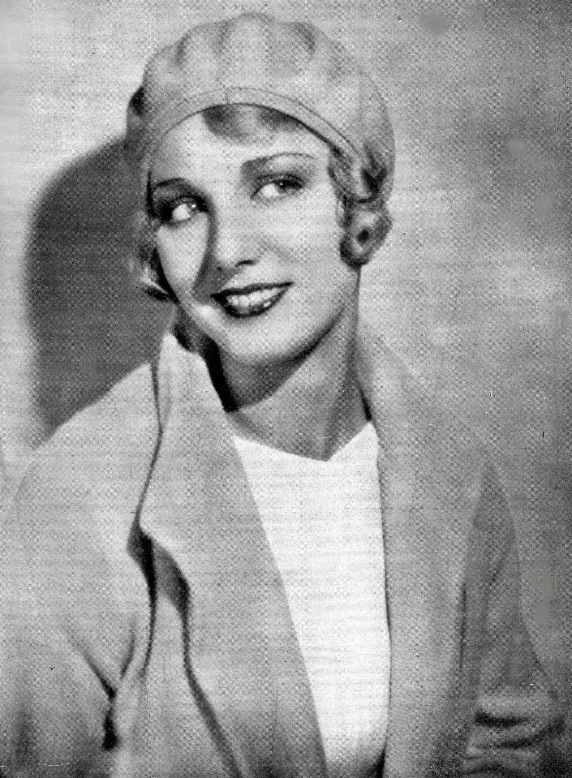 L'attrice Leila Hyams in un'immagine diffusa in Italia nel 1932